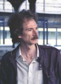 Foto Gianfranco Palmery